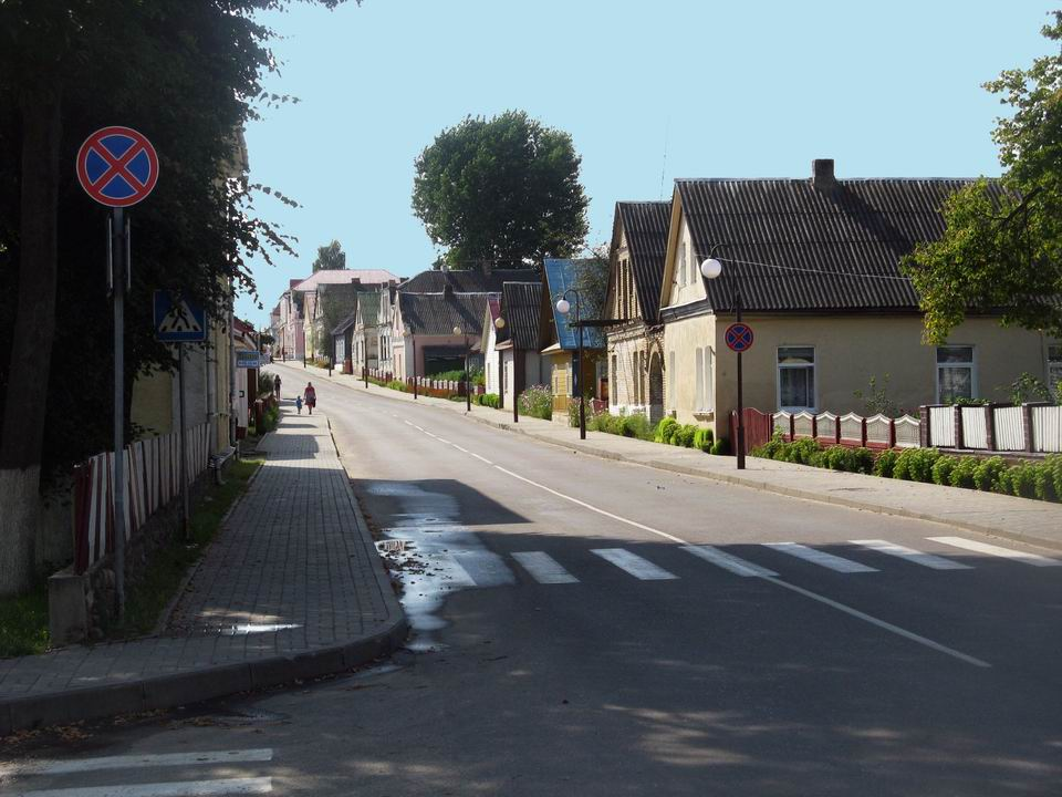 Беларуская (тарашкевіца): Іўе